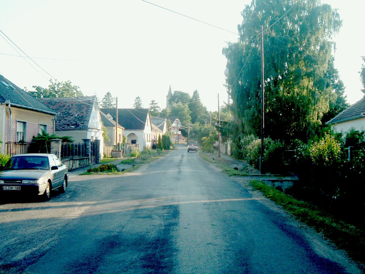 Gór, Hungary